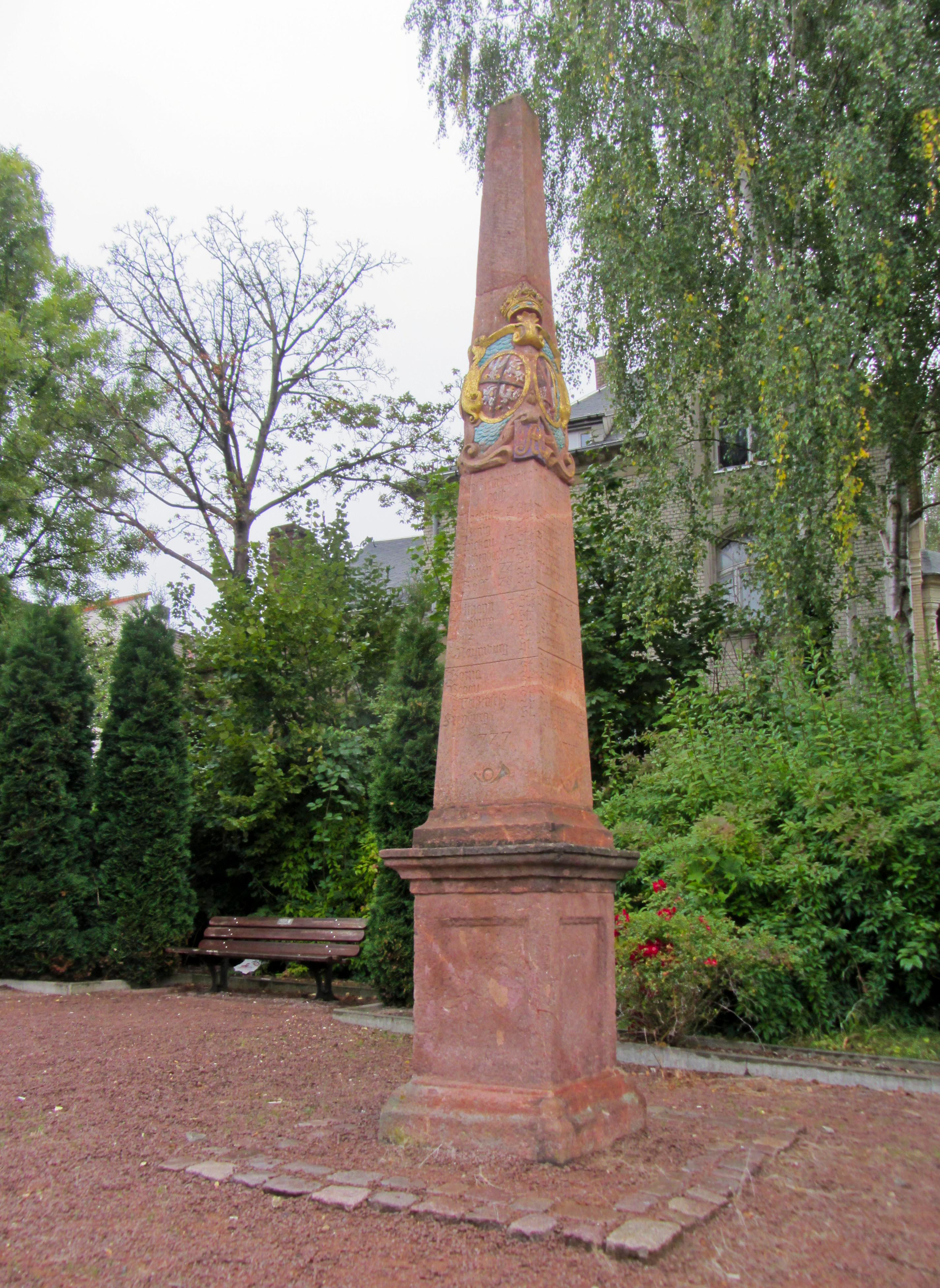 Kursächsische Postmeilensäule-Distanzsäule, Bahnhofstraße in Geringswalde einer Restaurierung 1983 am heutigen Standort aufgestellt